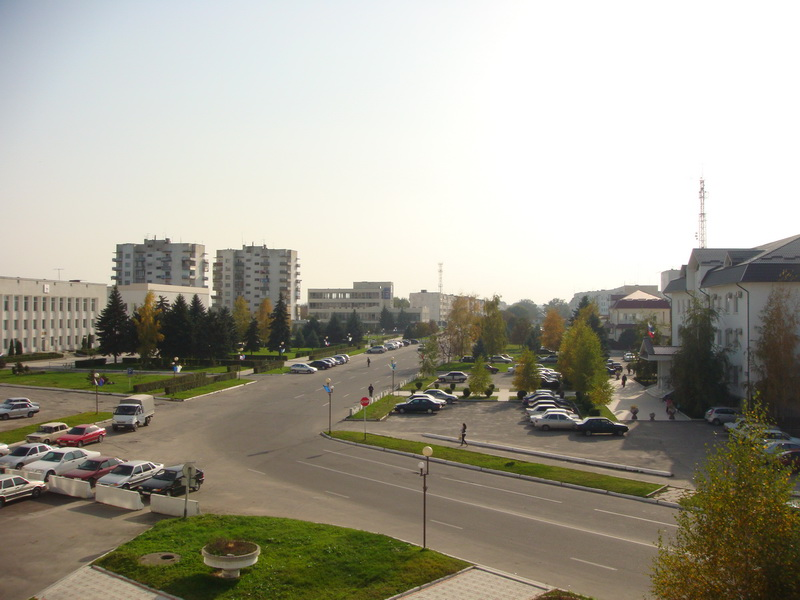 Адыгэбзэ: Нарткъалэ и къалэку